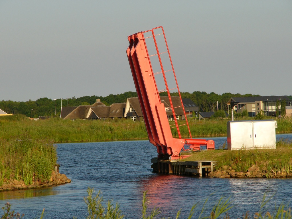 Blauwe Stad, künstlich angelegte Wasser-Wohn-Landschaft bei Winschoten